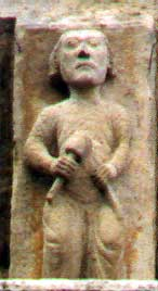 Canecillo de la Iglesia romanica del s.XII en Tudela - Navarra - España autor de la fotografía user:papix